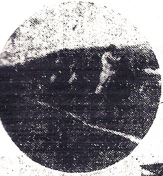 昭和６年５月１９日の河北新報に掲載された２０１２年５月現在著作権保護期間を過ぎた写真をトリミングし、コントラスト調整をしました。昭和６年５月１６日の石巻競馬場での競馬の光景です。